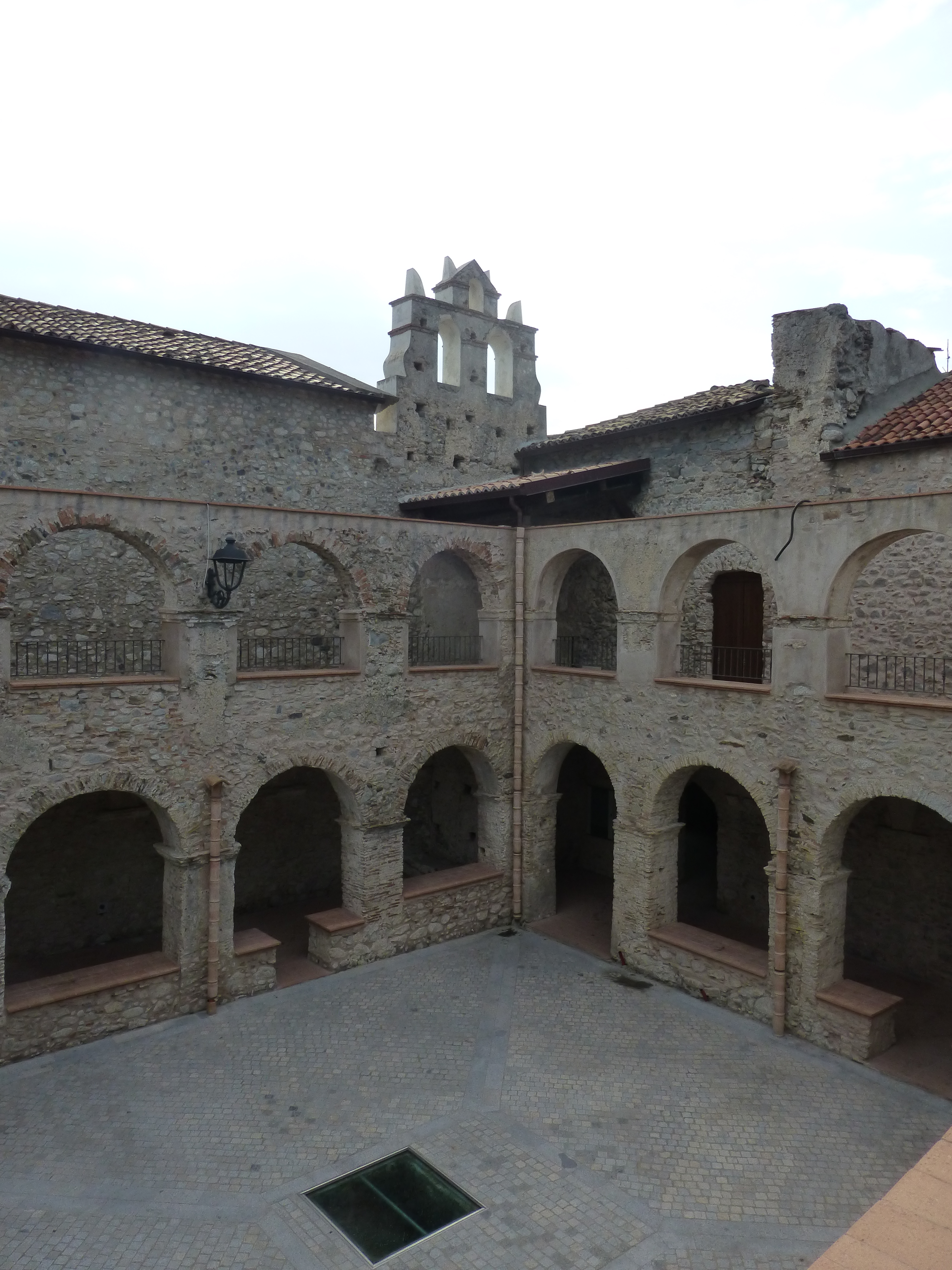 Convento domenico con campanile placanica